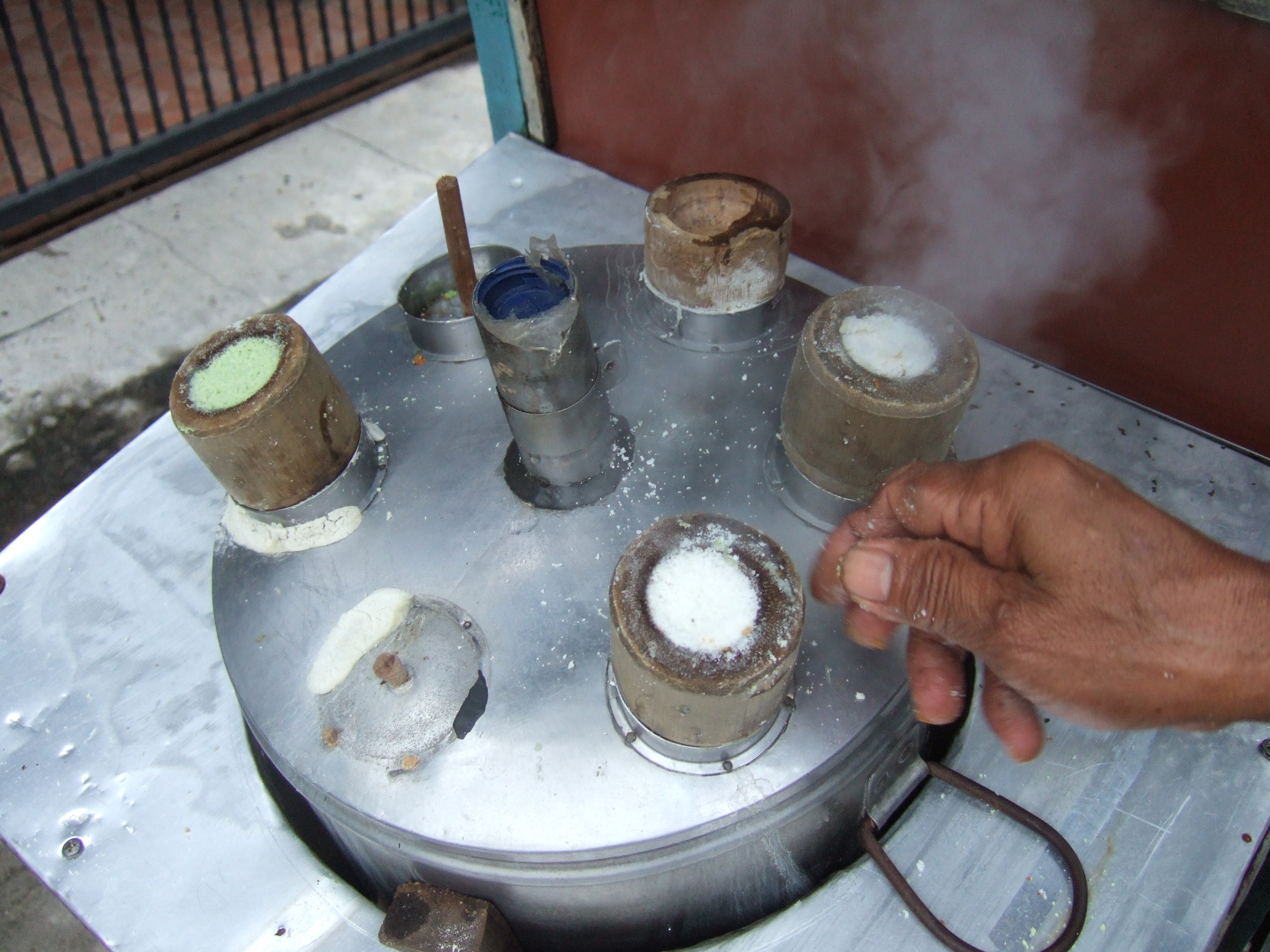 Kue putu keliling, Jakarta